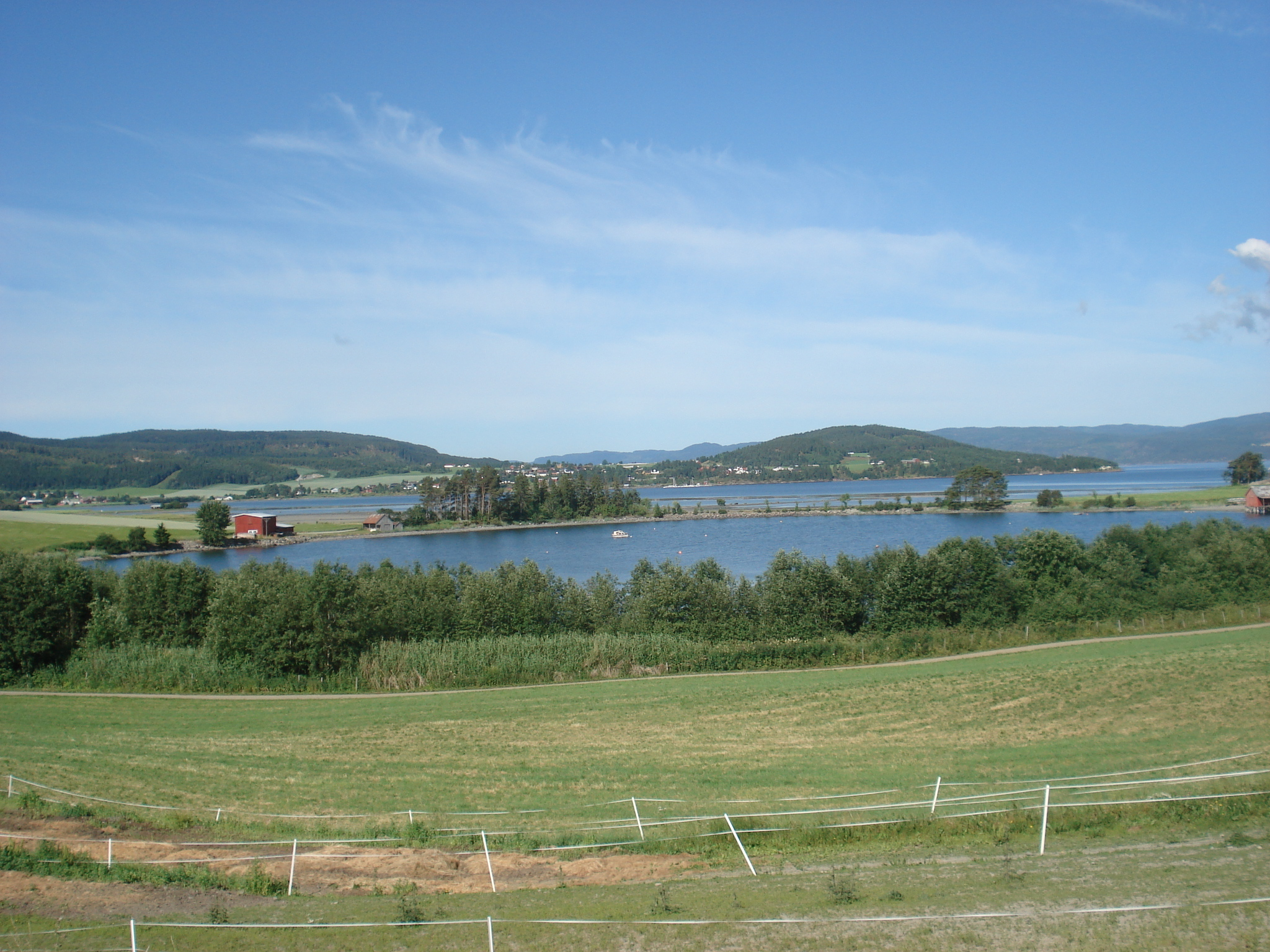 Minnestein over myrmenn på Framnes, Ekne.